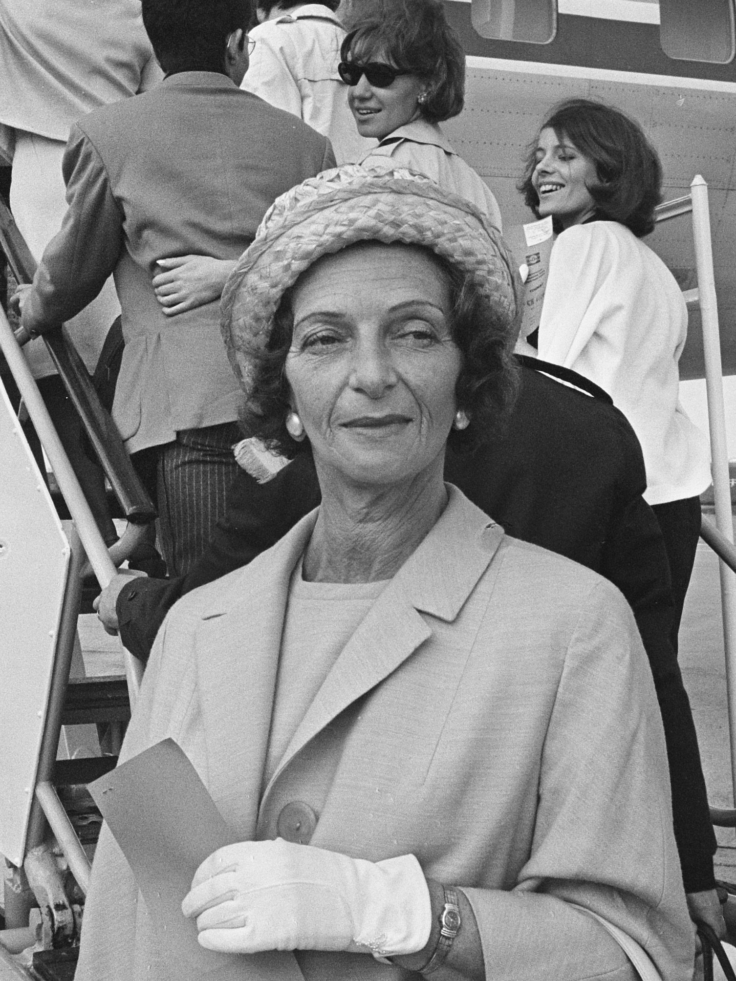 Nationaal Ballet naar Joegoslavie vertrokken, op voorgrond Sonia Gaskell